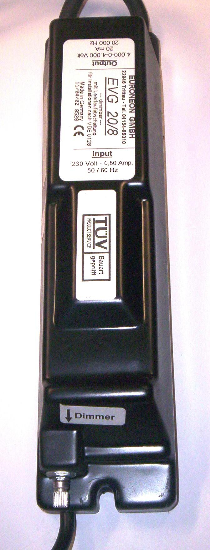 EVG für Leuchtröhren